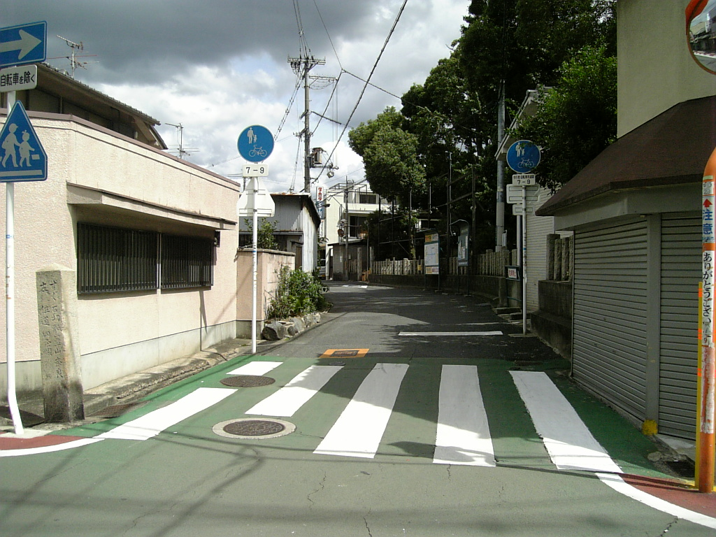 河内街道と暗越奈良街道の交差点（東大阪市菱屋東）画面左右方向が河内街道。前後方向が暗越奈良街道。